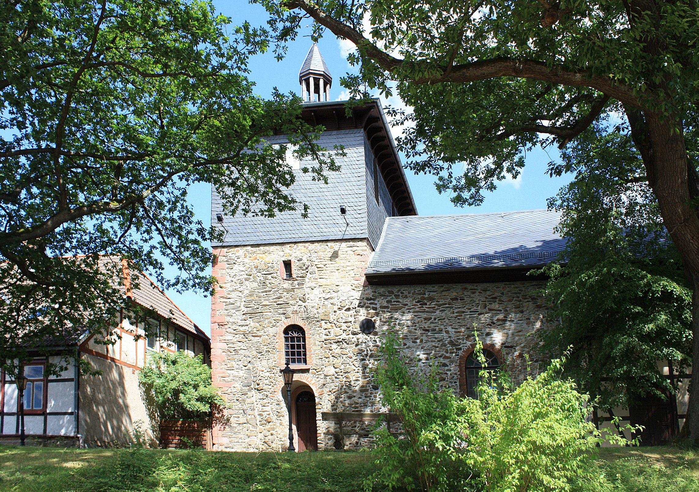 Breitenstein (Südharz), the village church